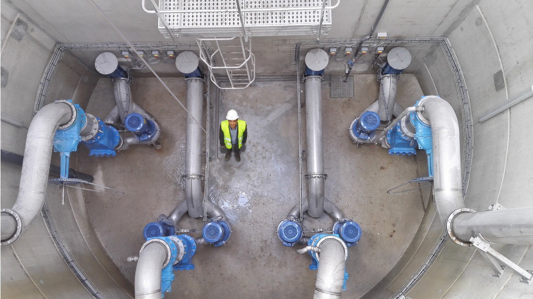 Exemple de pompage en ligne sur le poste de relevage de Coulommiers (77)